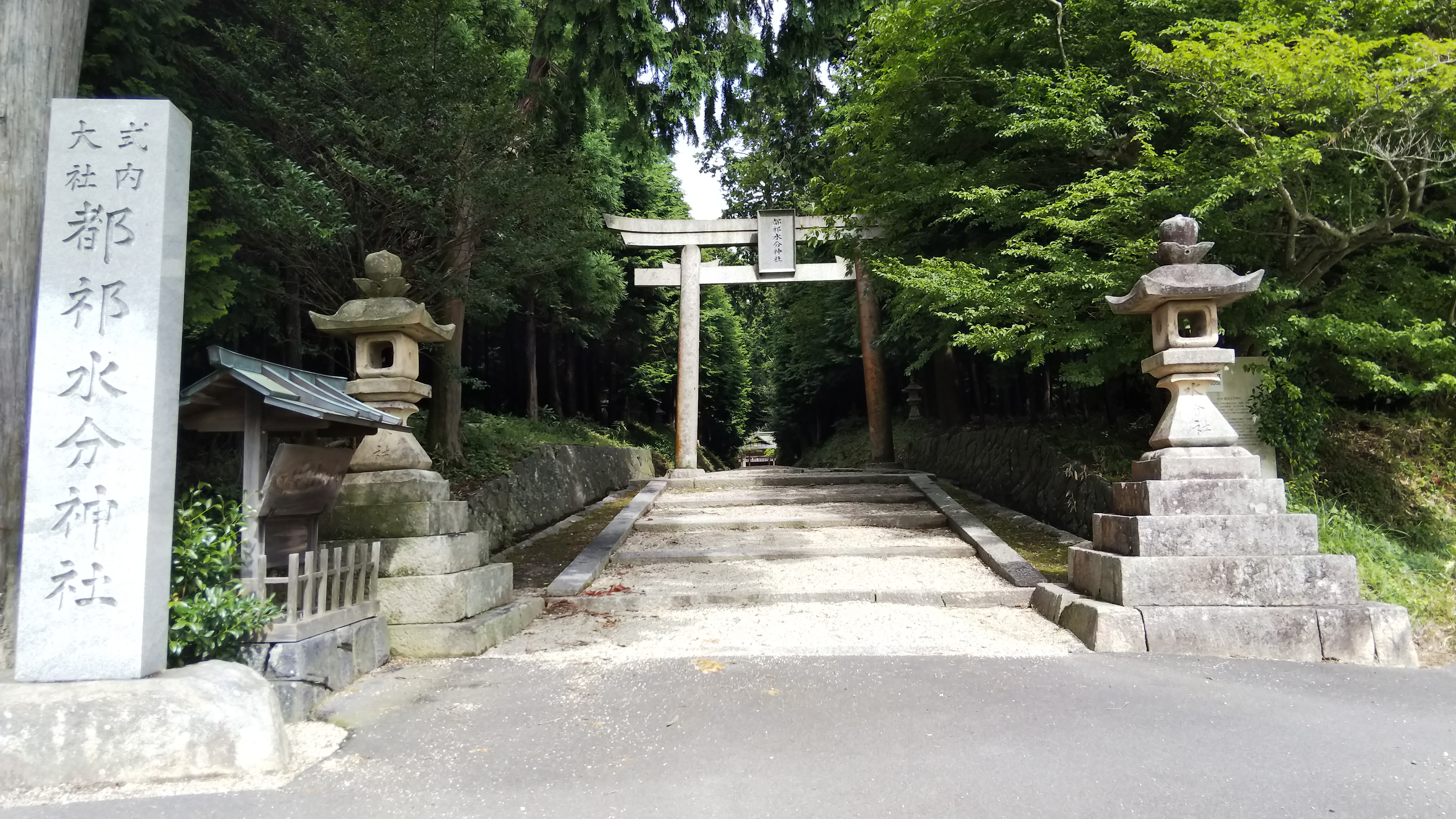 都祁水分神社鳥居